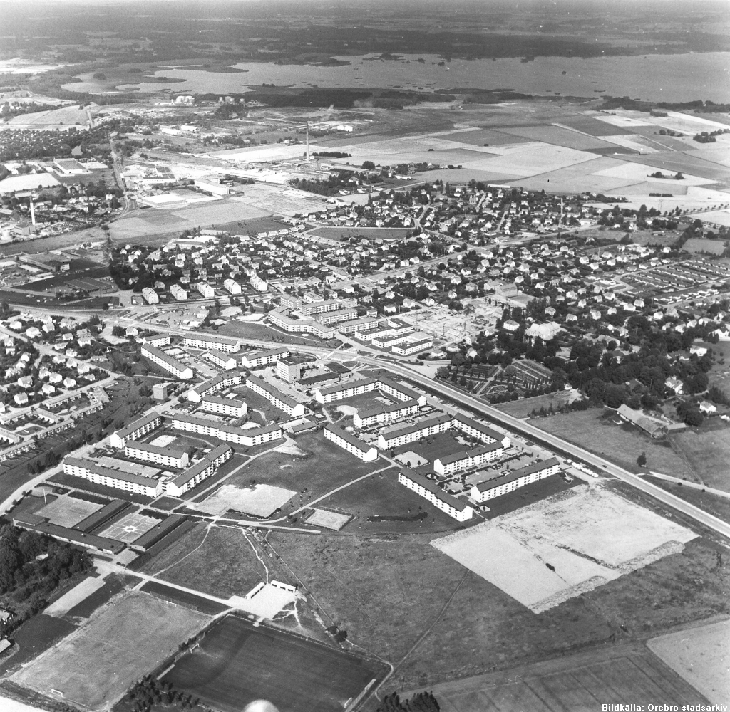 Flygbild över Almby och Tybble 1967